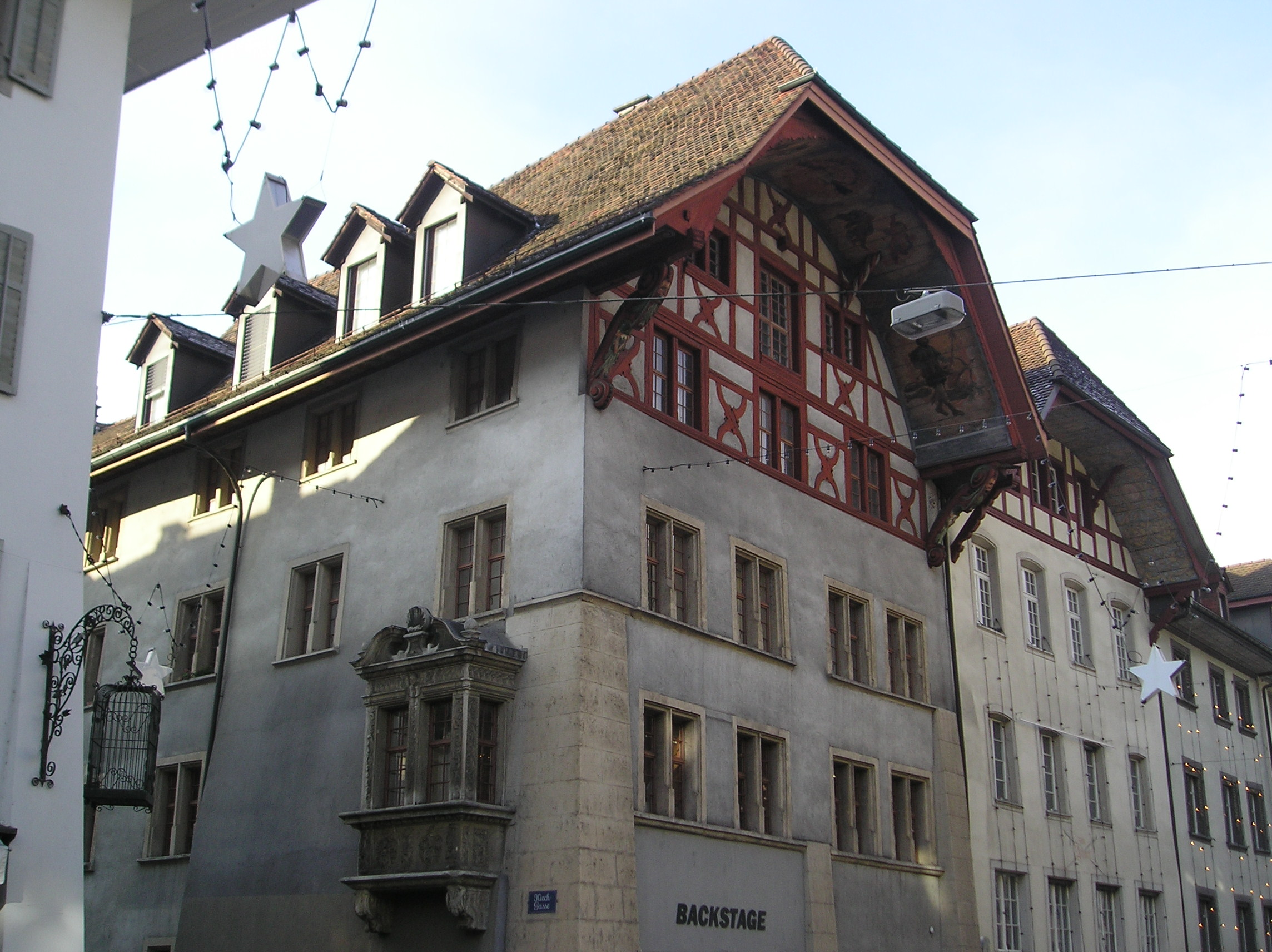 Questa foto rappresenta un tipico edificio di Aarau, è stata scattata da me, G. Salluzzi nel dic. 2004 ed è rilasciata in Pubblico Dominio